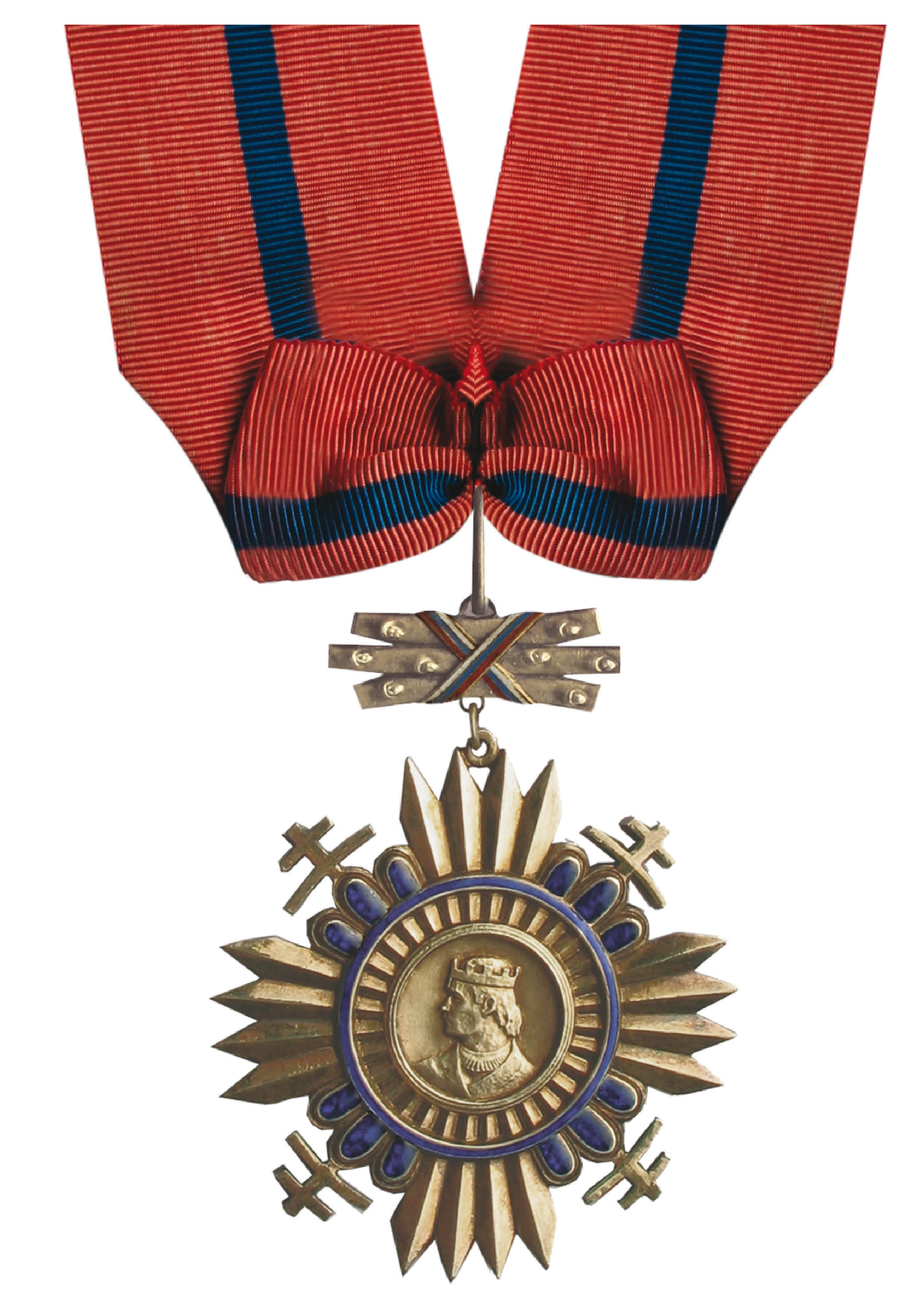 Veliteľský kríž Radu knižaťa Pribinu 3. triedy vojnovej Slovenskej republiky 1940-45